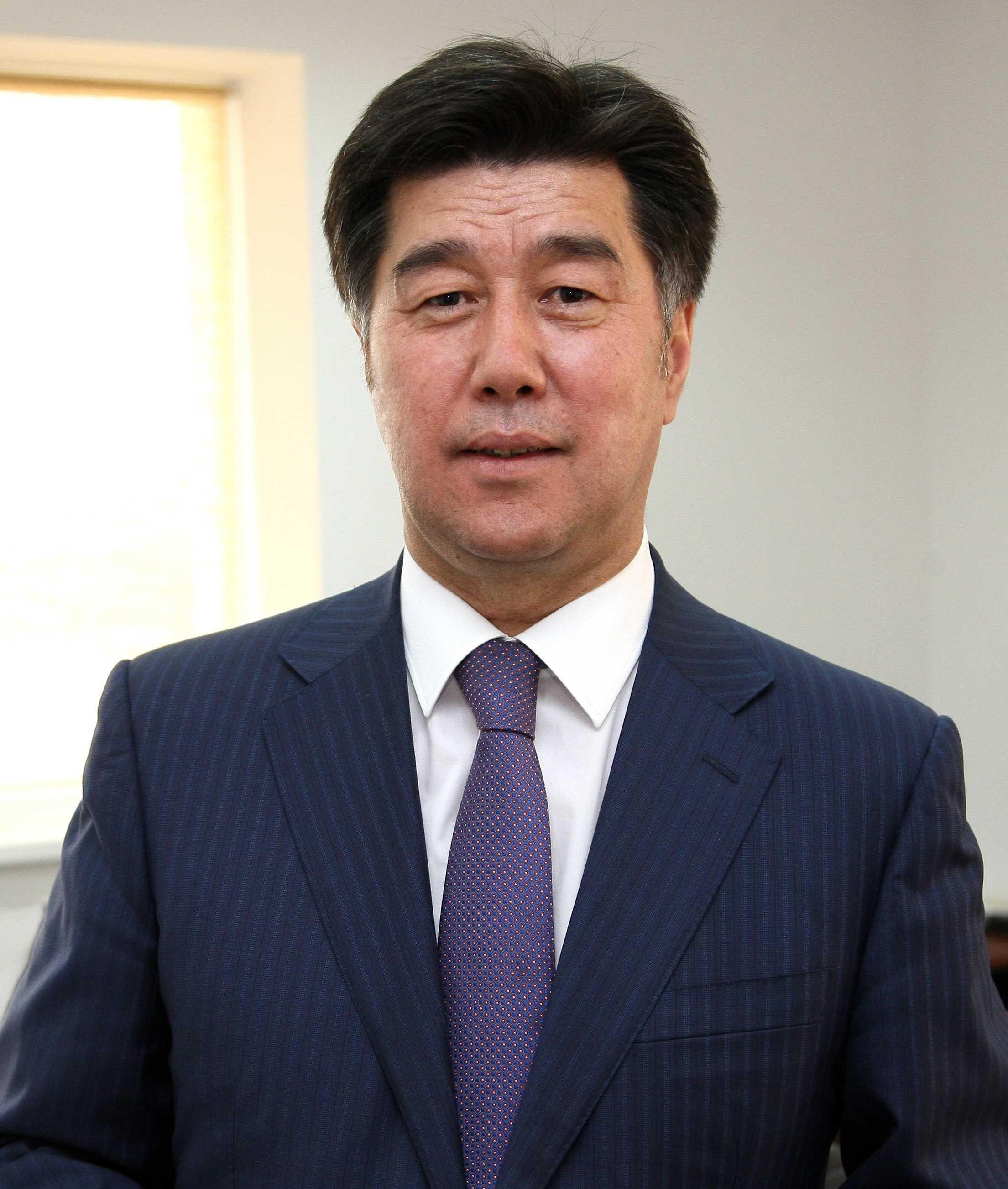 Қазақша (кирил): Alikhan Baimenov